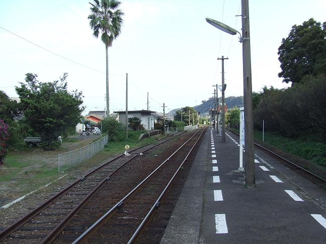 JR生見駅ホーム